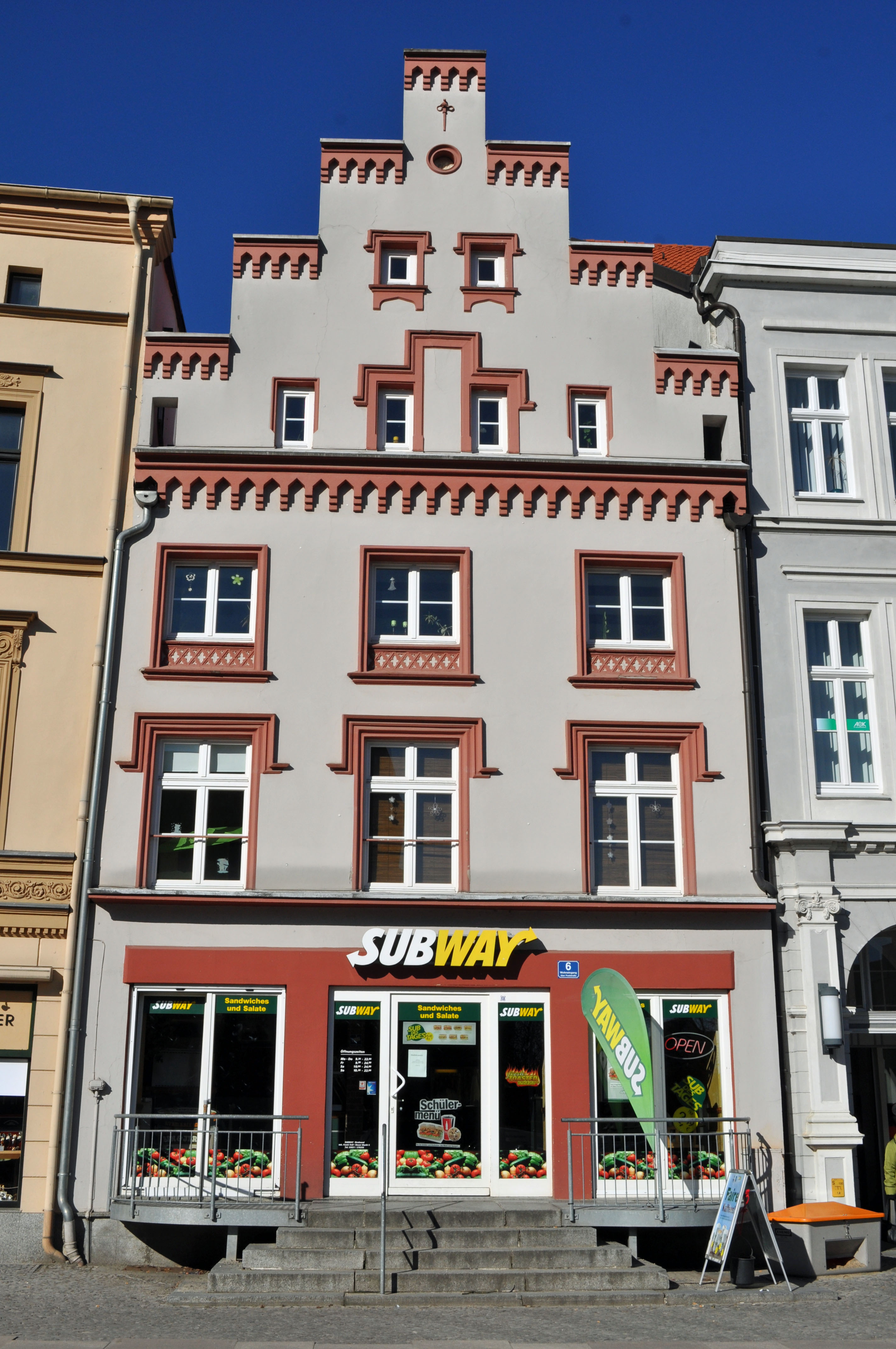 Gebäude bzw. Gebäudedetail in Stralsund. Straße und Hausnummer siehe Dateiname. Das Gebäude ist als Baudenkmal ausgewiesen, siehe dazu die Liste der Baudenkmale in Stralsund.